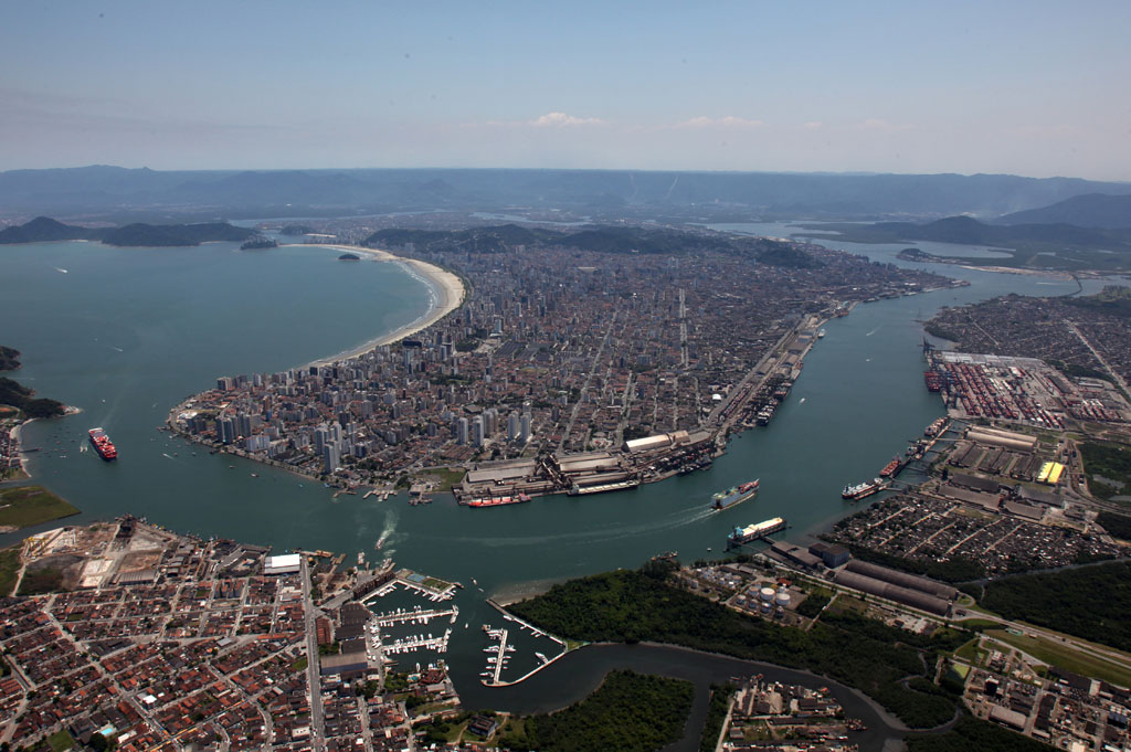 Fotografia aérea de Santos, São Paulo, Brasil.